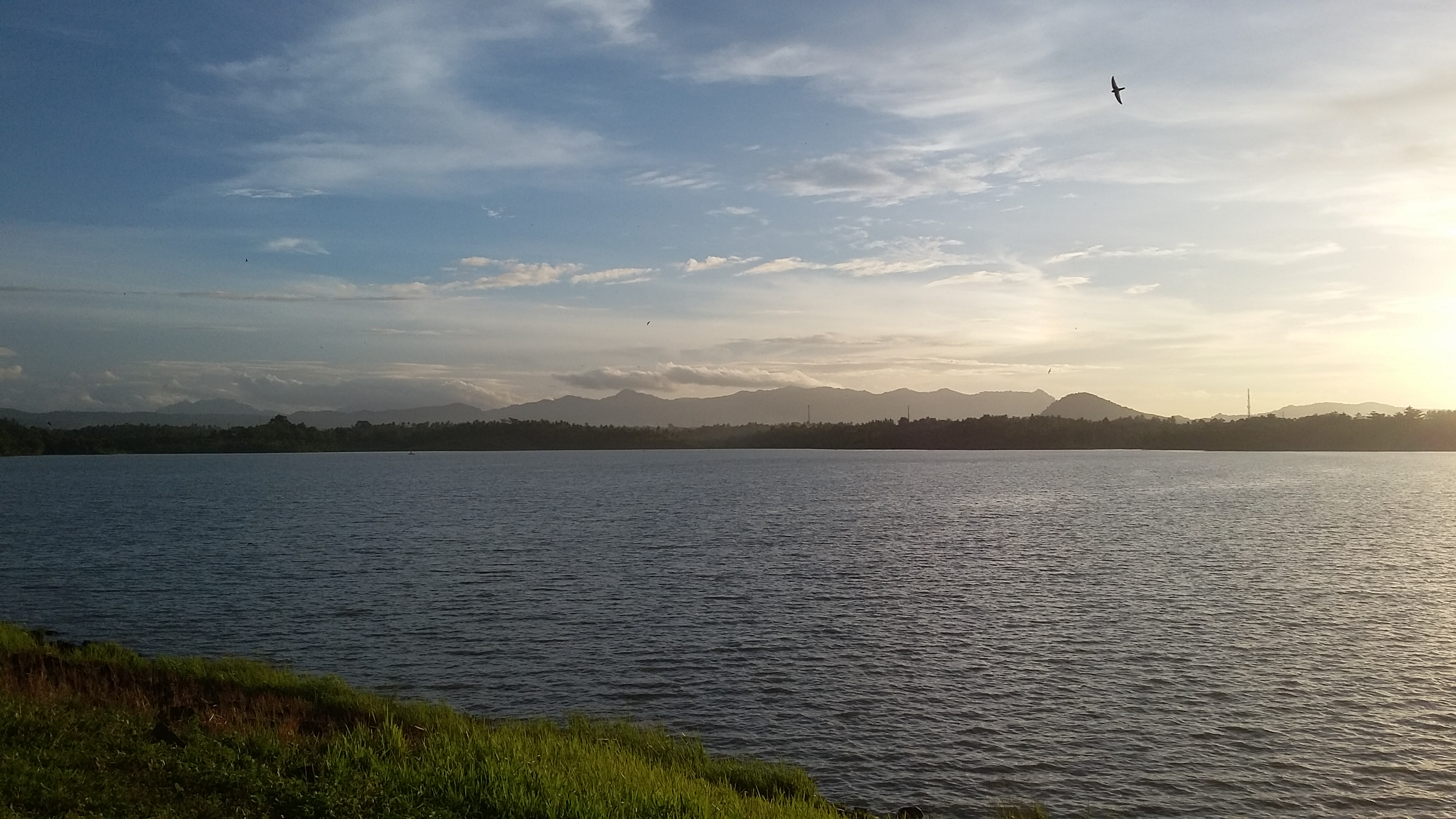 Menikmati indahnya pemandangan di sekitar danau sambil bersantai ria.